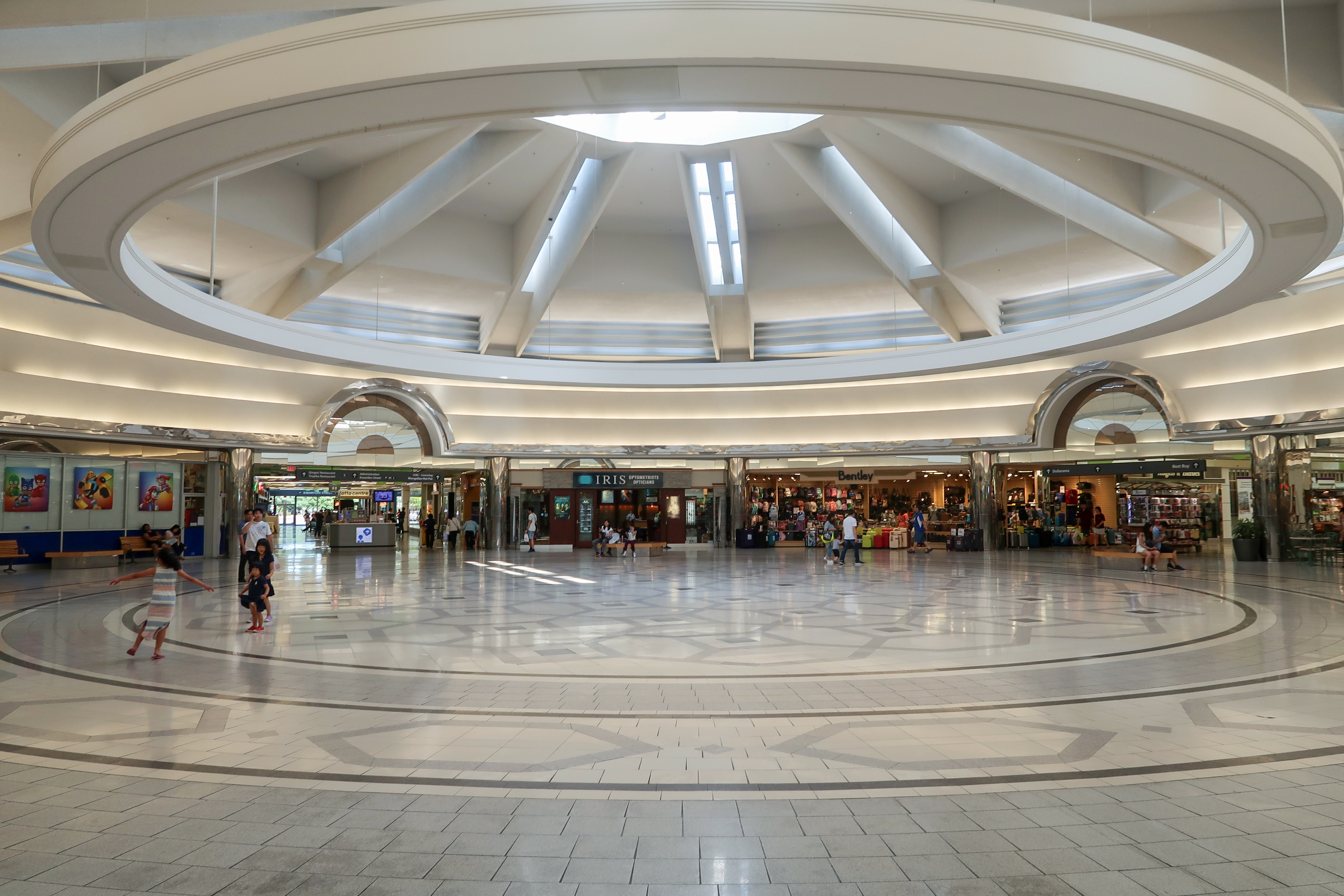 Lansdowne Centre Centre Court